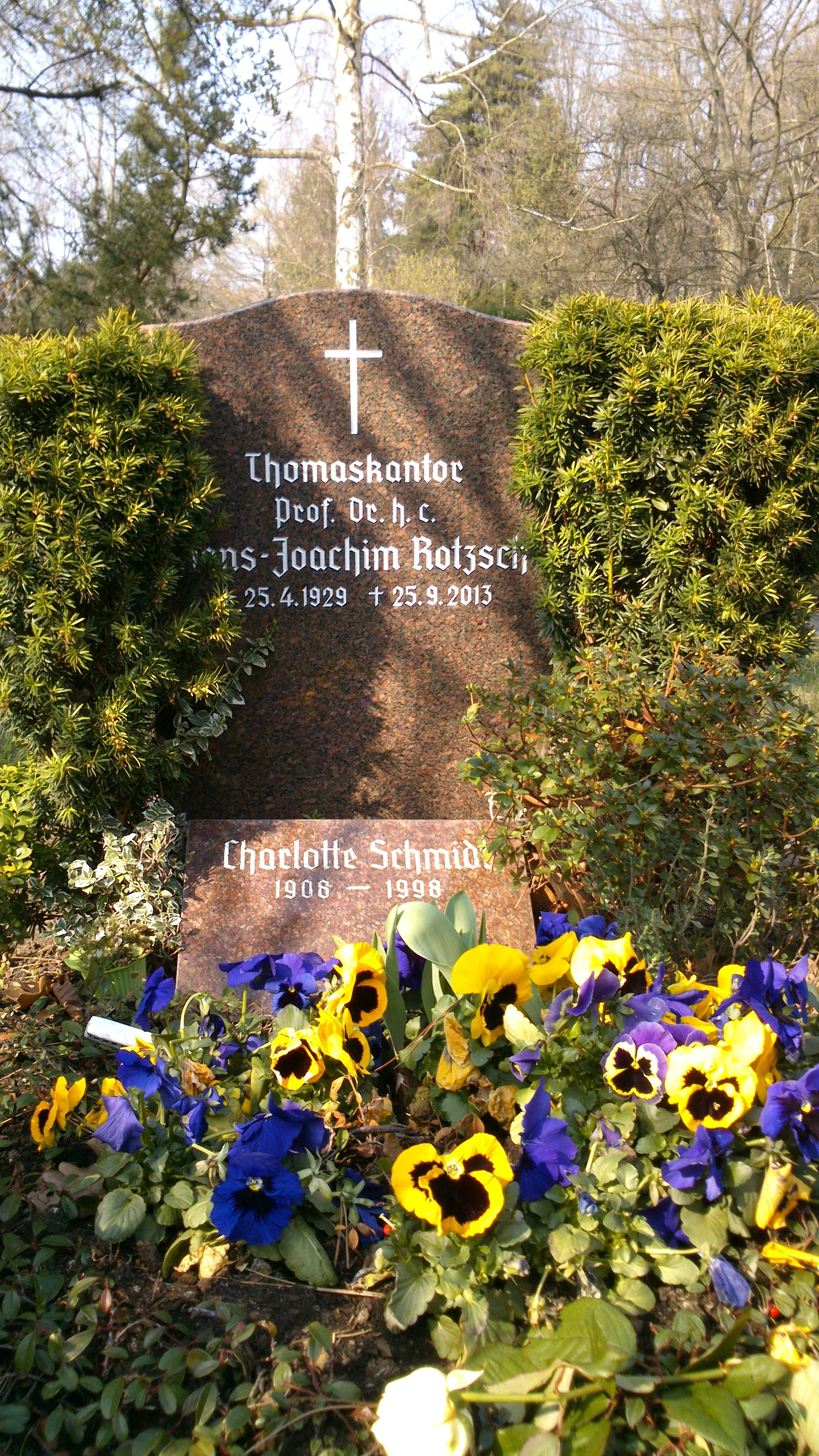 Urnen-Grabstätte von Hans-Joachim Rotzsch auf dem Südfriedhof in Leipzig